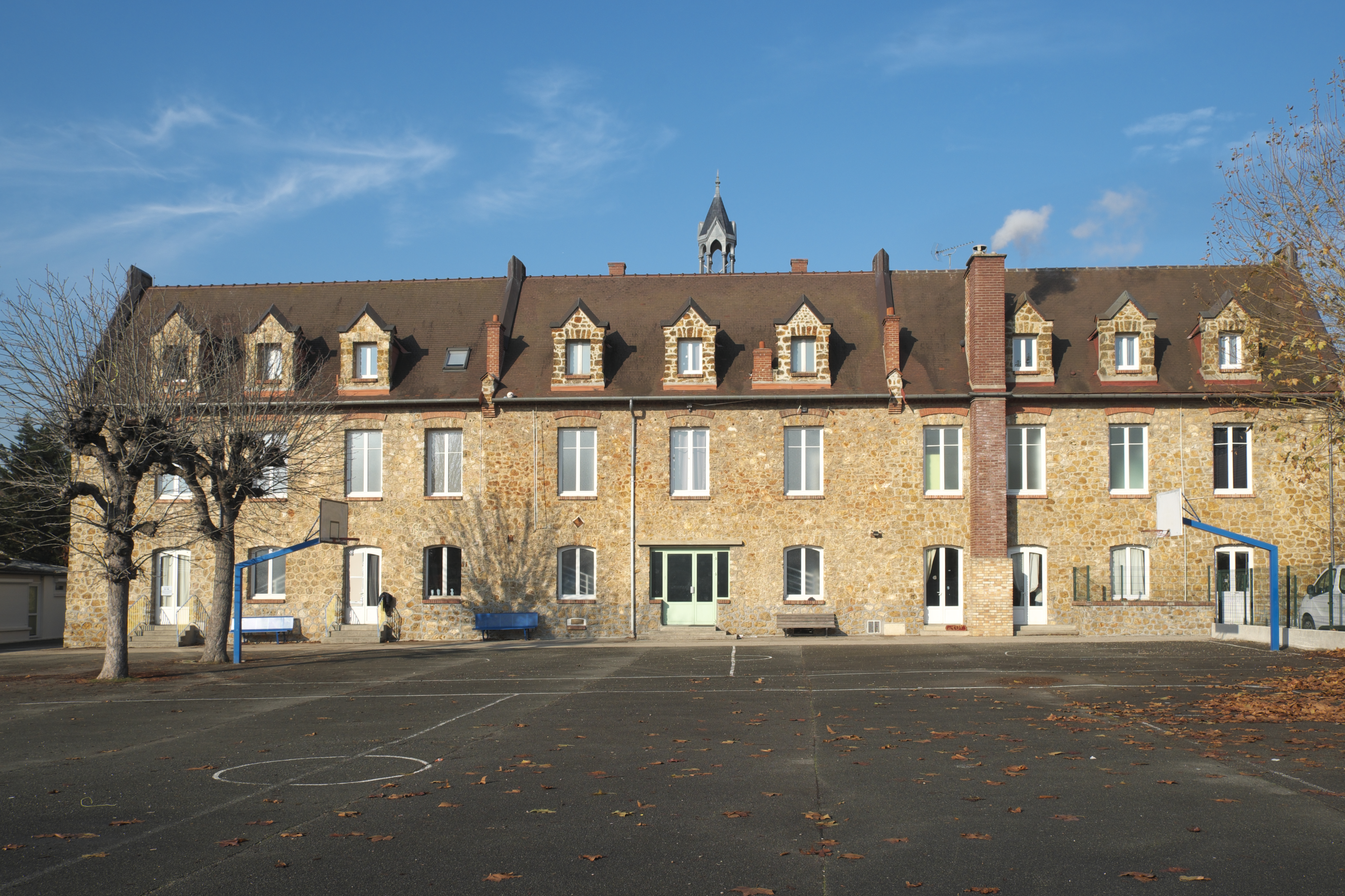 Maison Saint-Charles in Le Vésinet im Département Yvelines (Île-de-France/Frankreich)